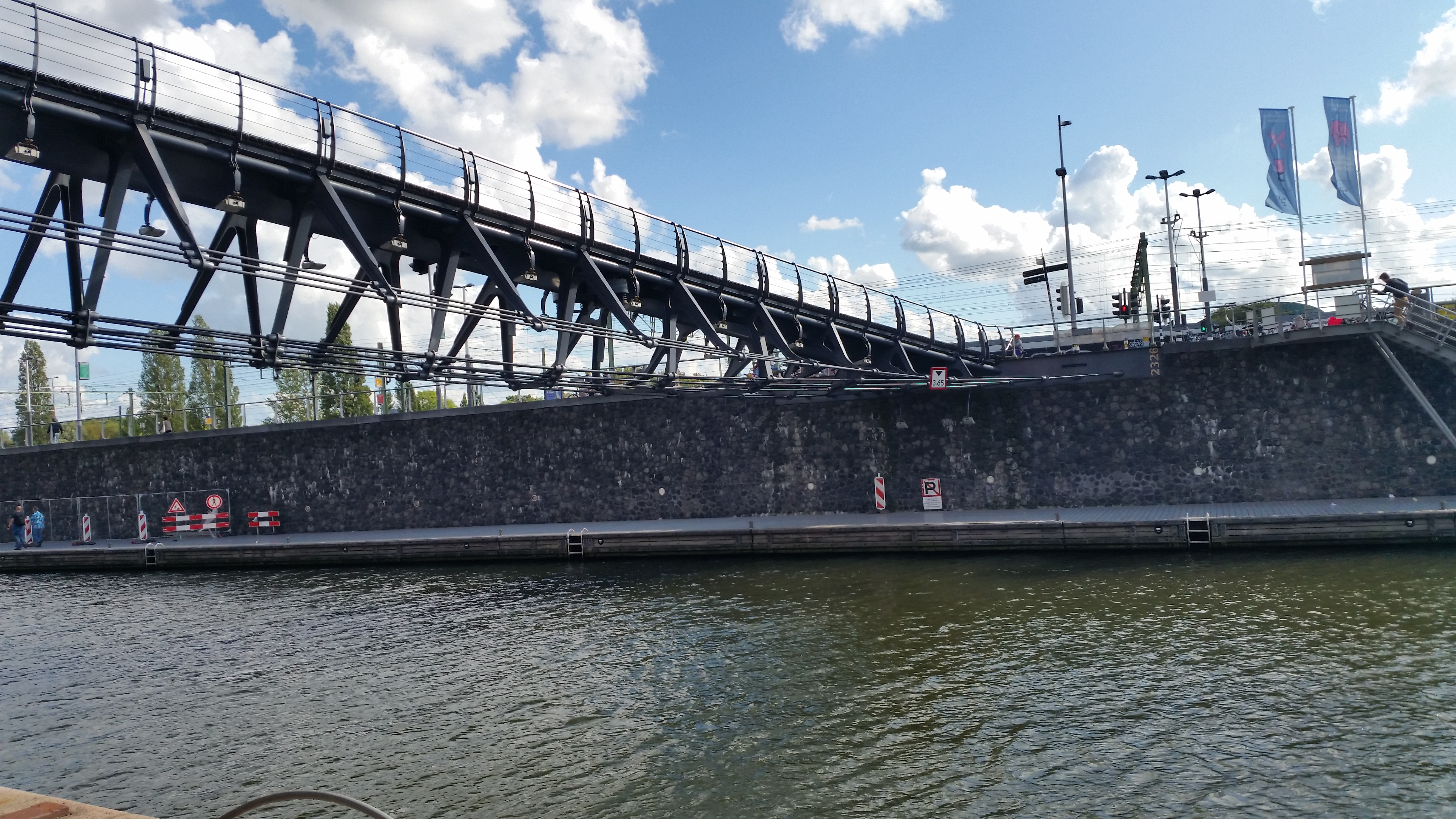 Brug 2326, Zouthavenbrug; rechts brugnummer